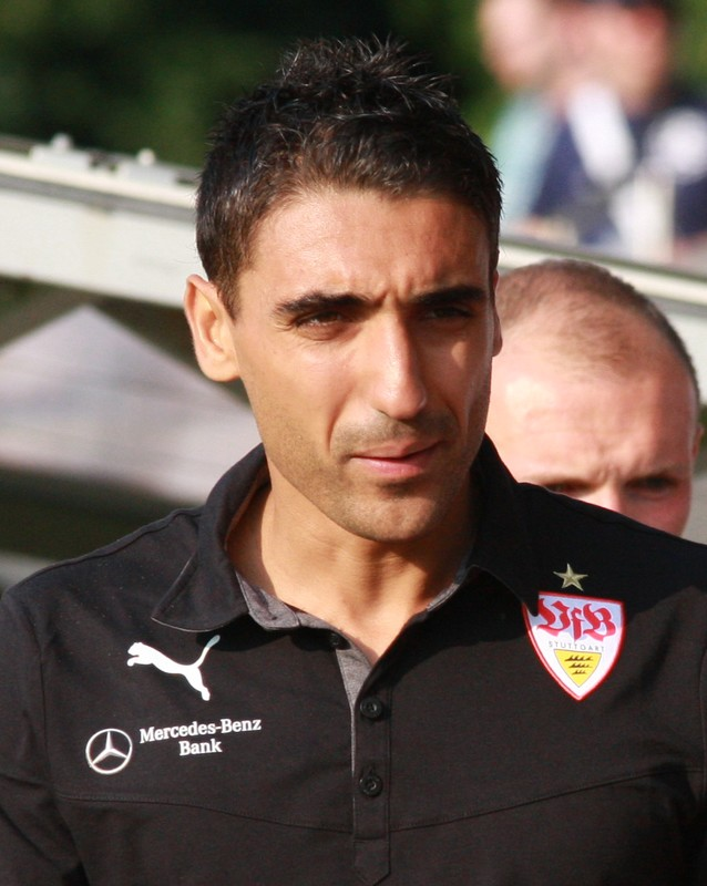 Mohammed Abdellauoe nach seiner Auswechslung beim Stadtderby. Aufgenommen von